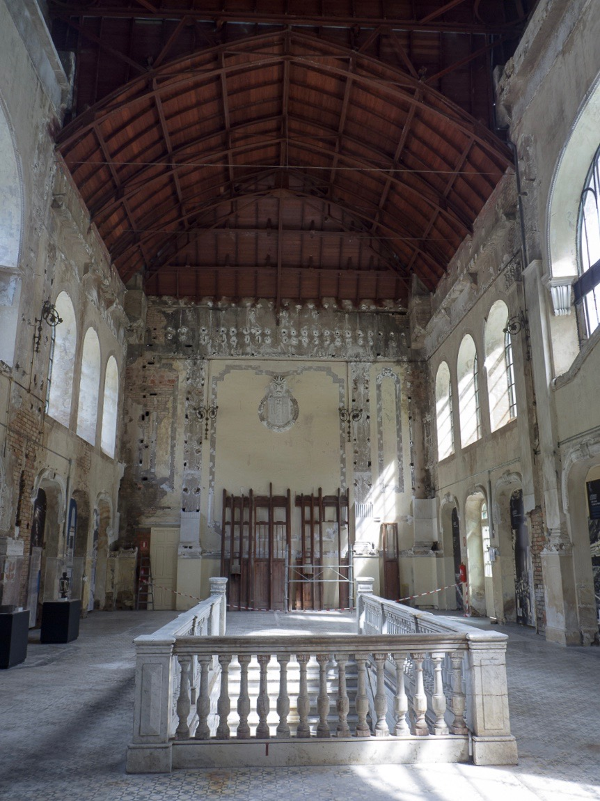 Vestíbulo central de la estación internacional de Canfranc.